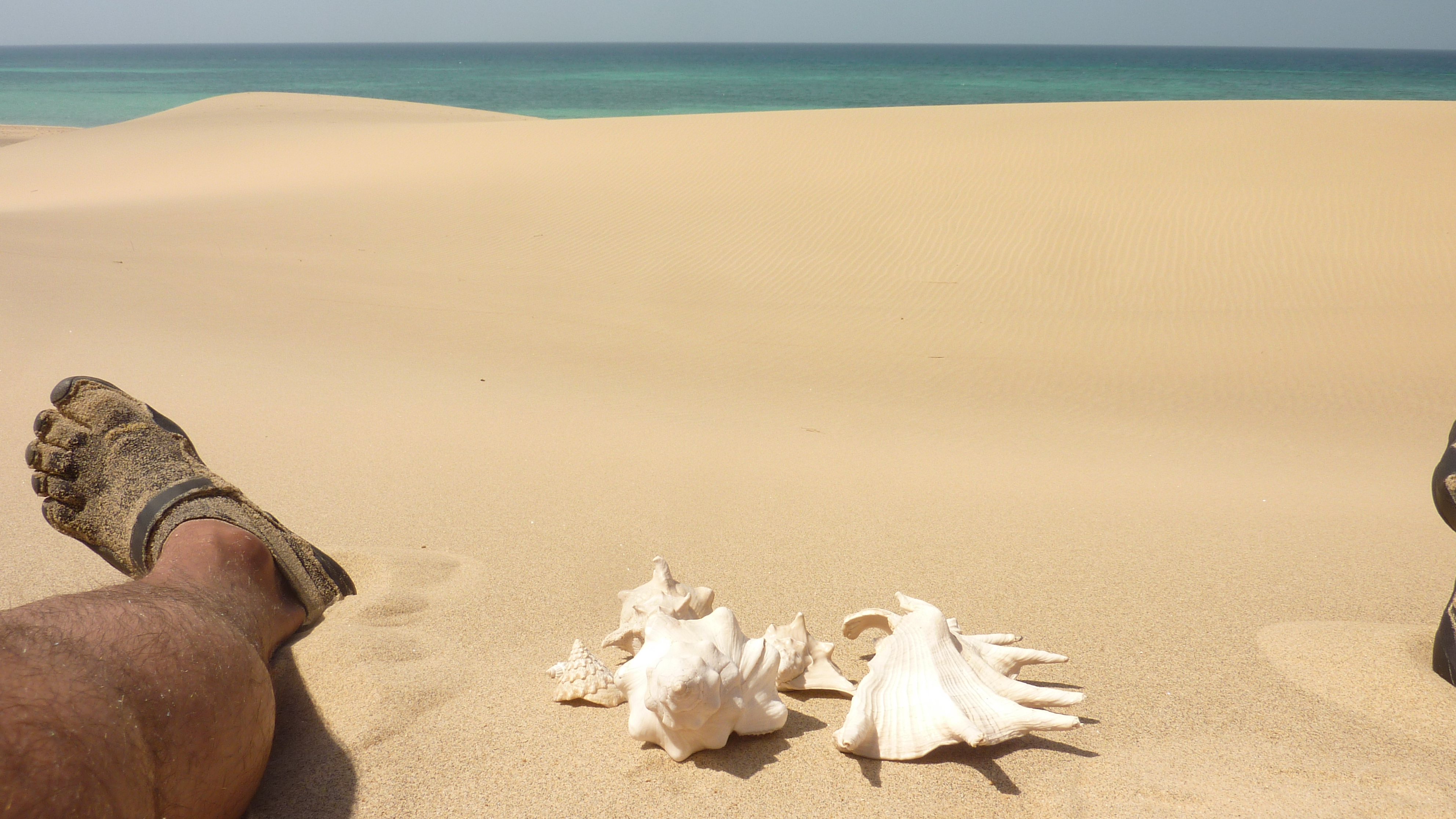 Berbera, Somaliland